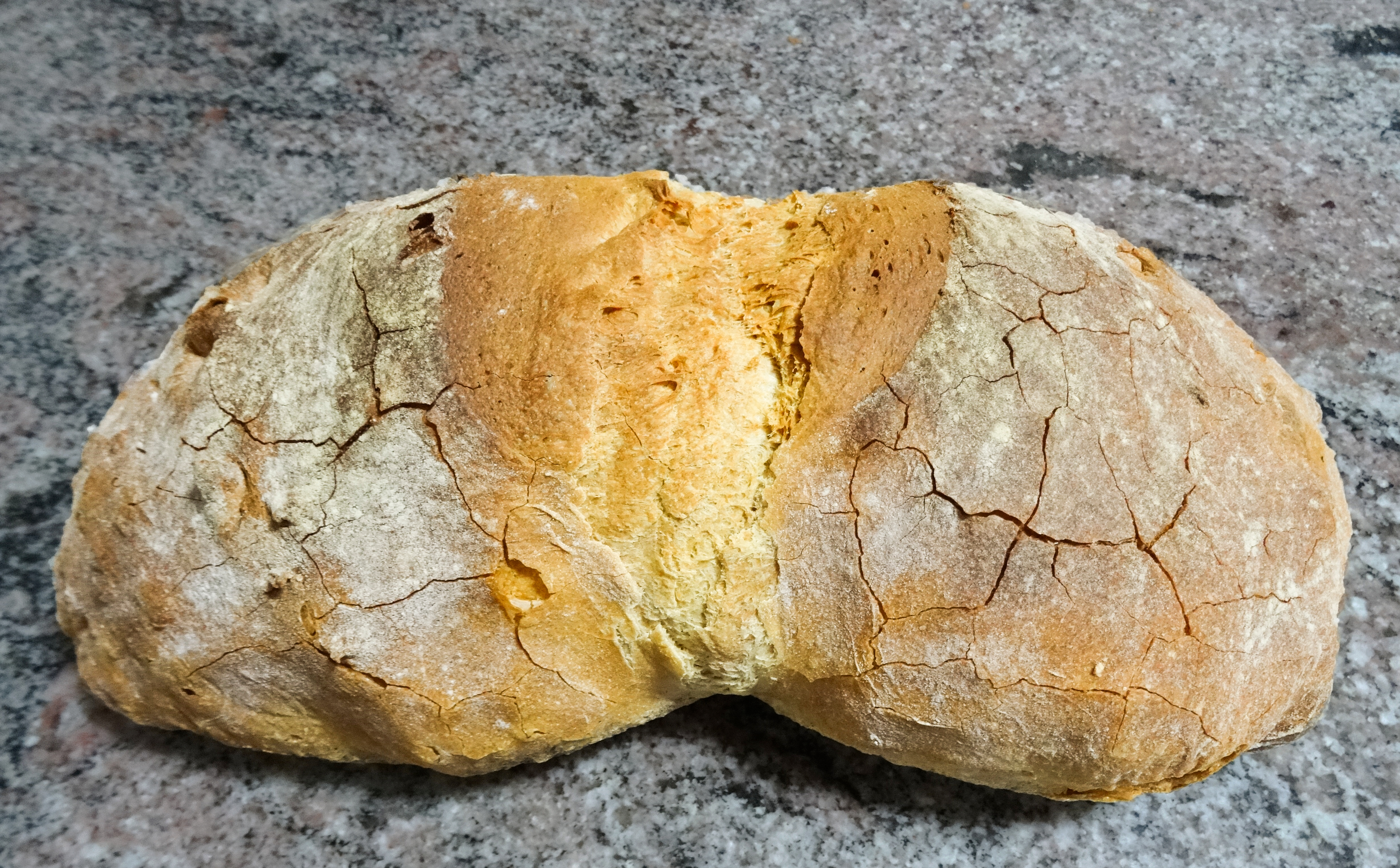 Ver título.